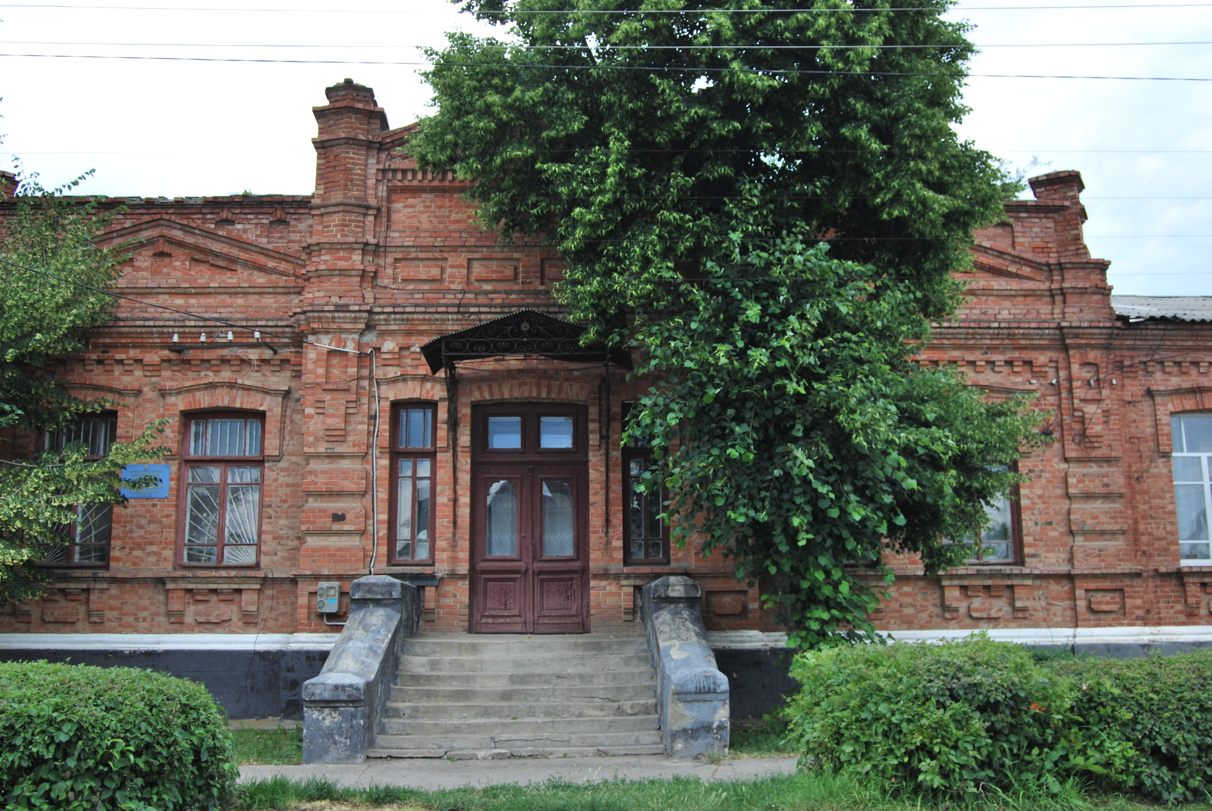 Будівля училища, Ананьїв, вул. Пушкіна, 62